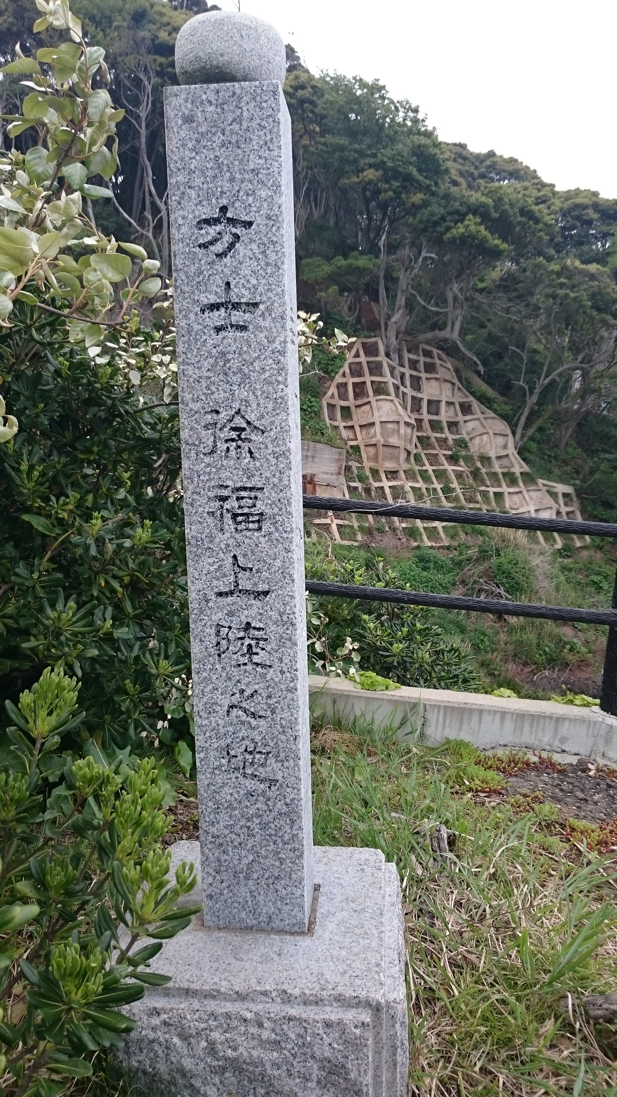 新井崎神社 「方士 徐福上陸之地」の碑。2016年4月撮影